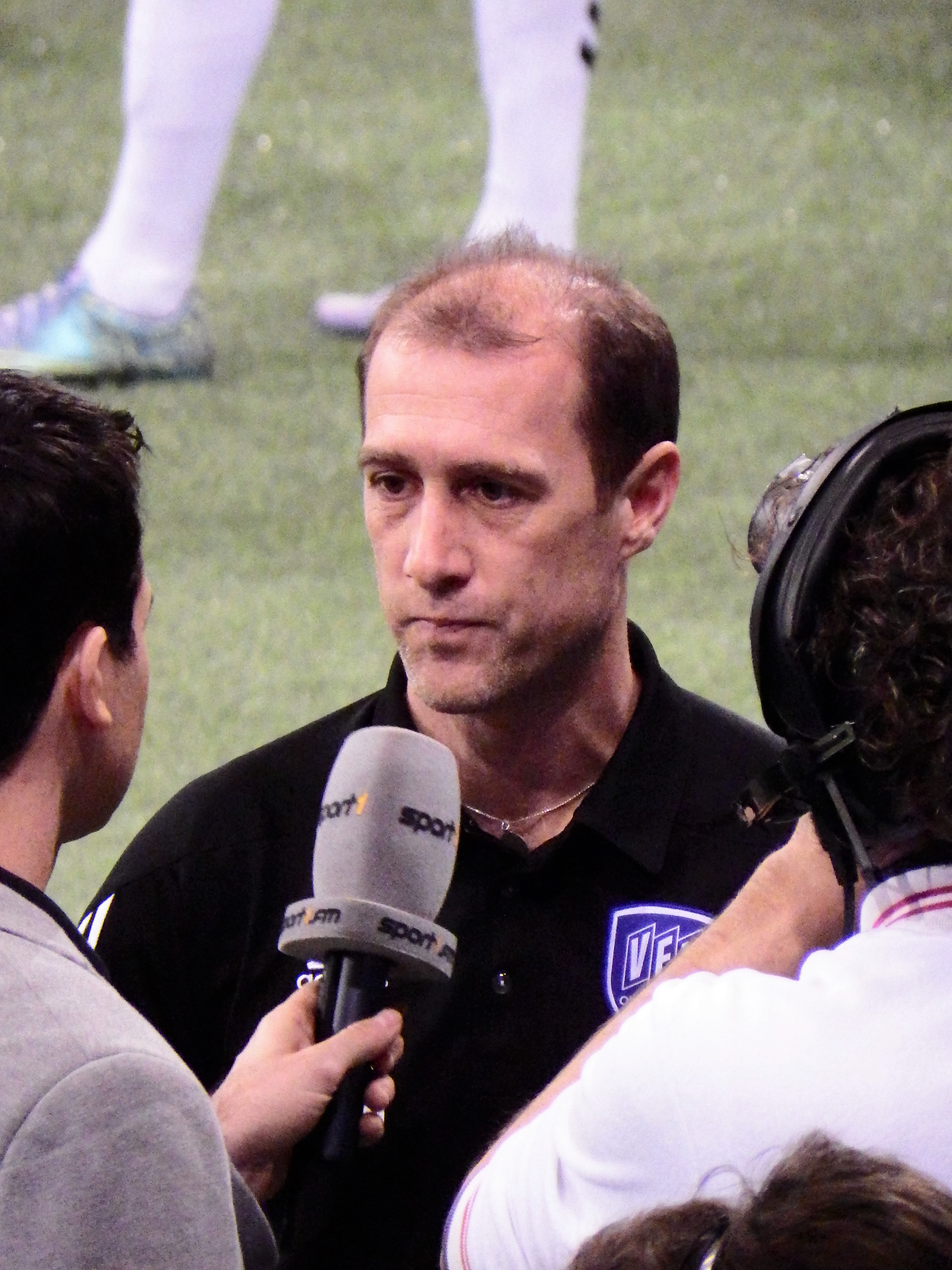 Joe Enochs, VfL Osnabrück